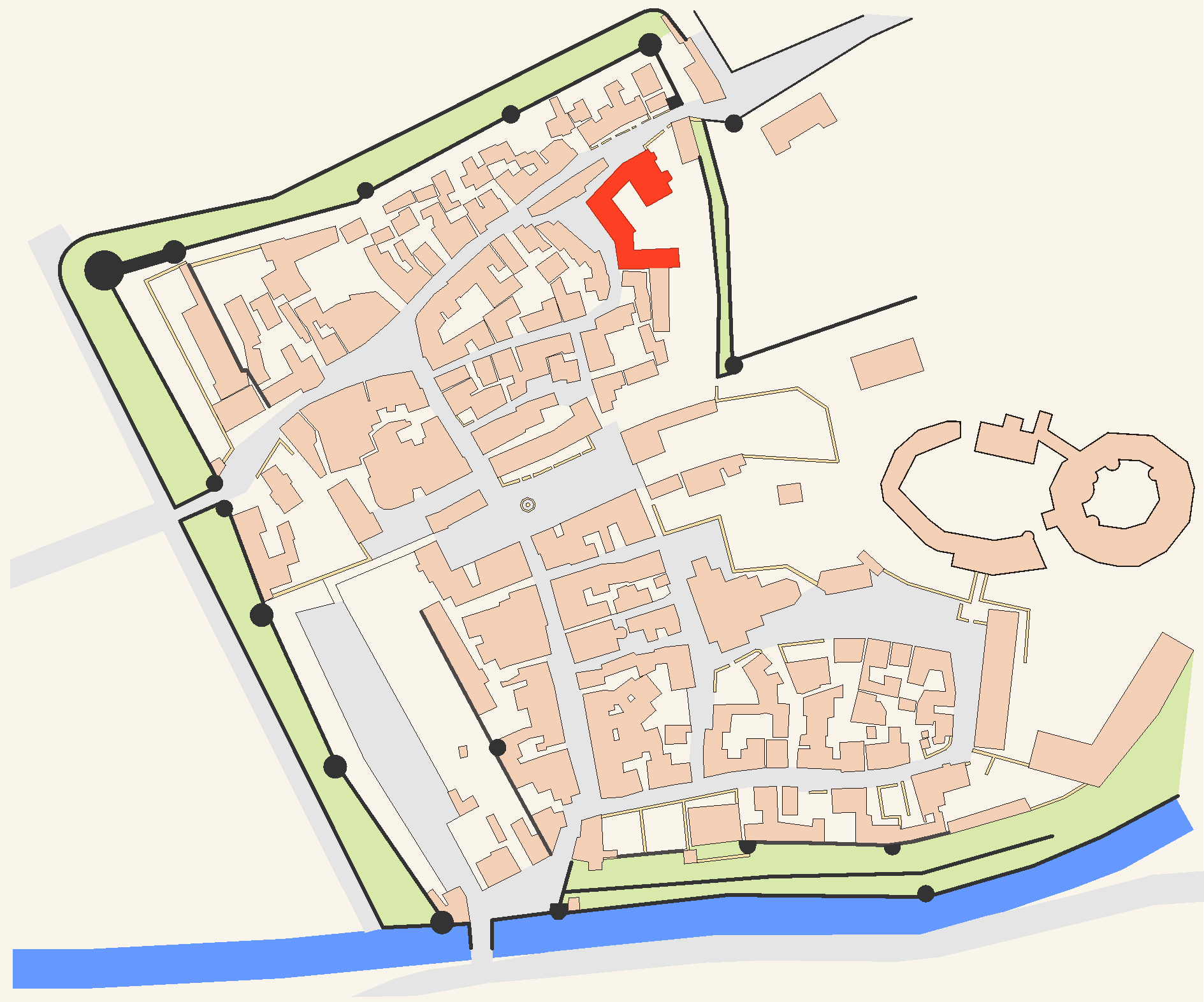 Stadtplan der Büdinger Altstadt - Hervorgehoben der Oberhof